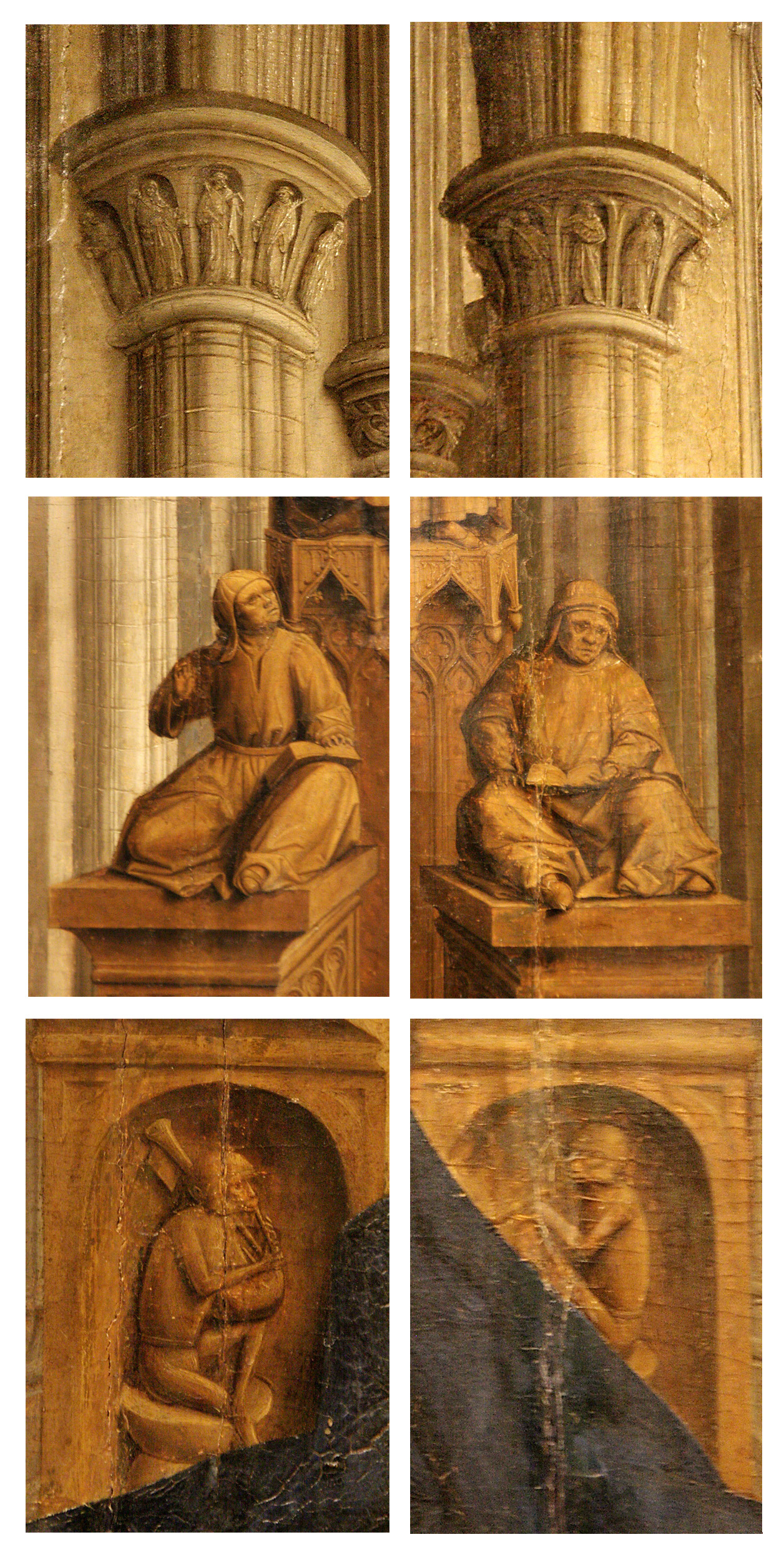 Mare de Déu dels Consellers, Museu Nacional d'Art de Catalunya, Barcelona. Elements iconogràfics